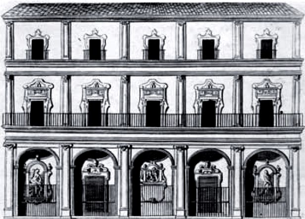 Incisione del 1718 della facciata del Pio Monte della Misericordia di Napoli